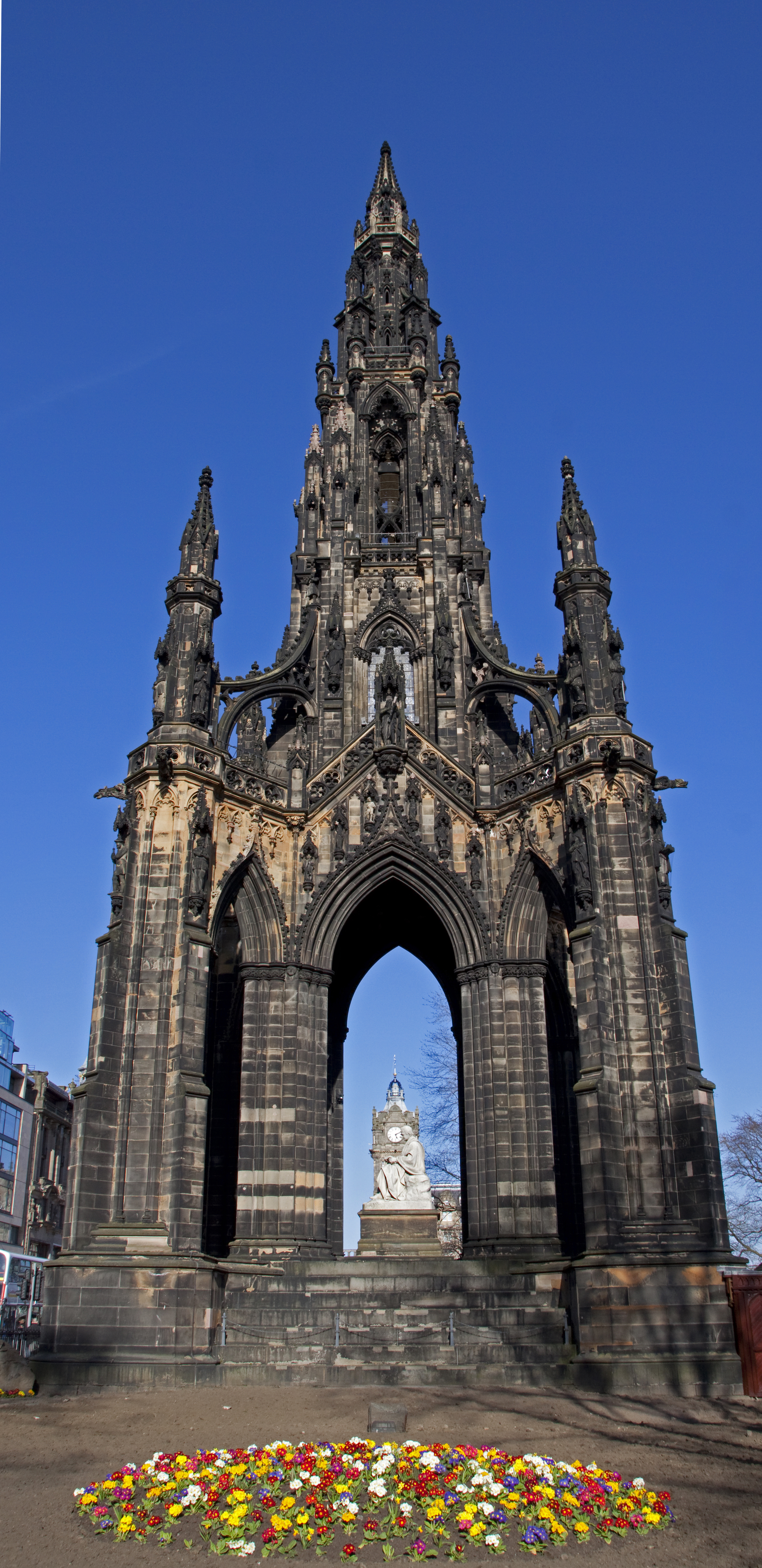 Scott Monument